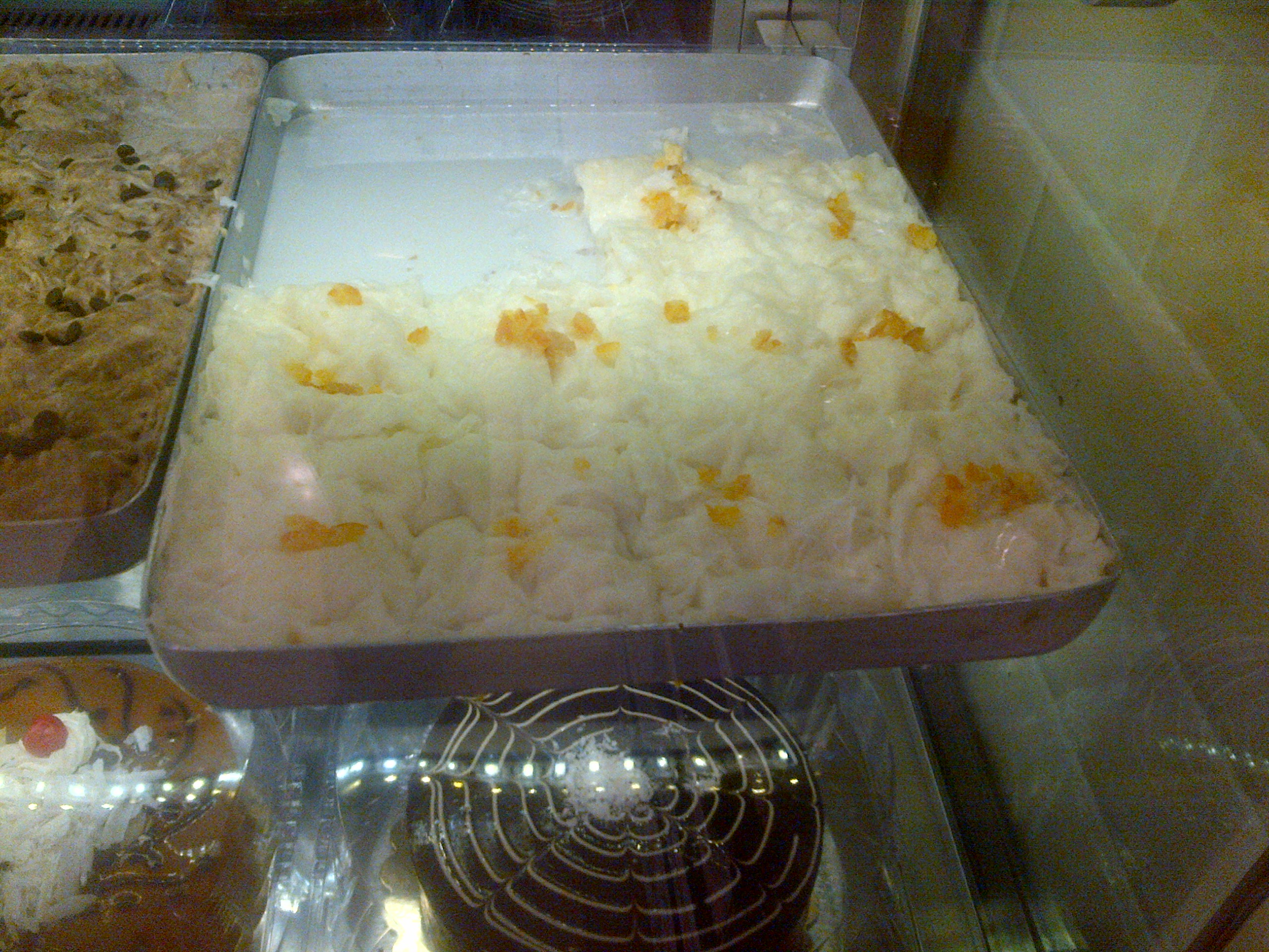 Güllaç en un "pastane" turco en el Ramadan de 2014.